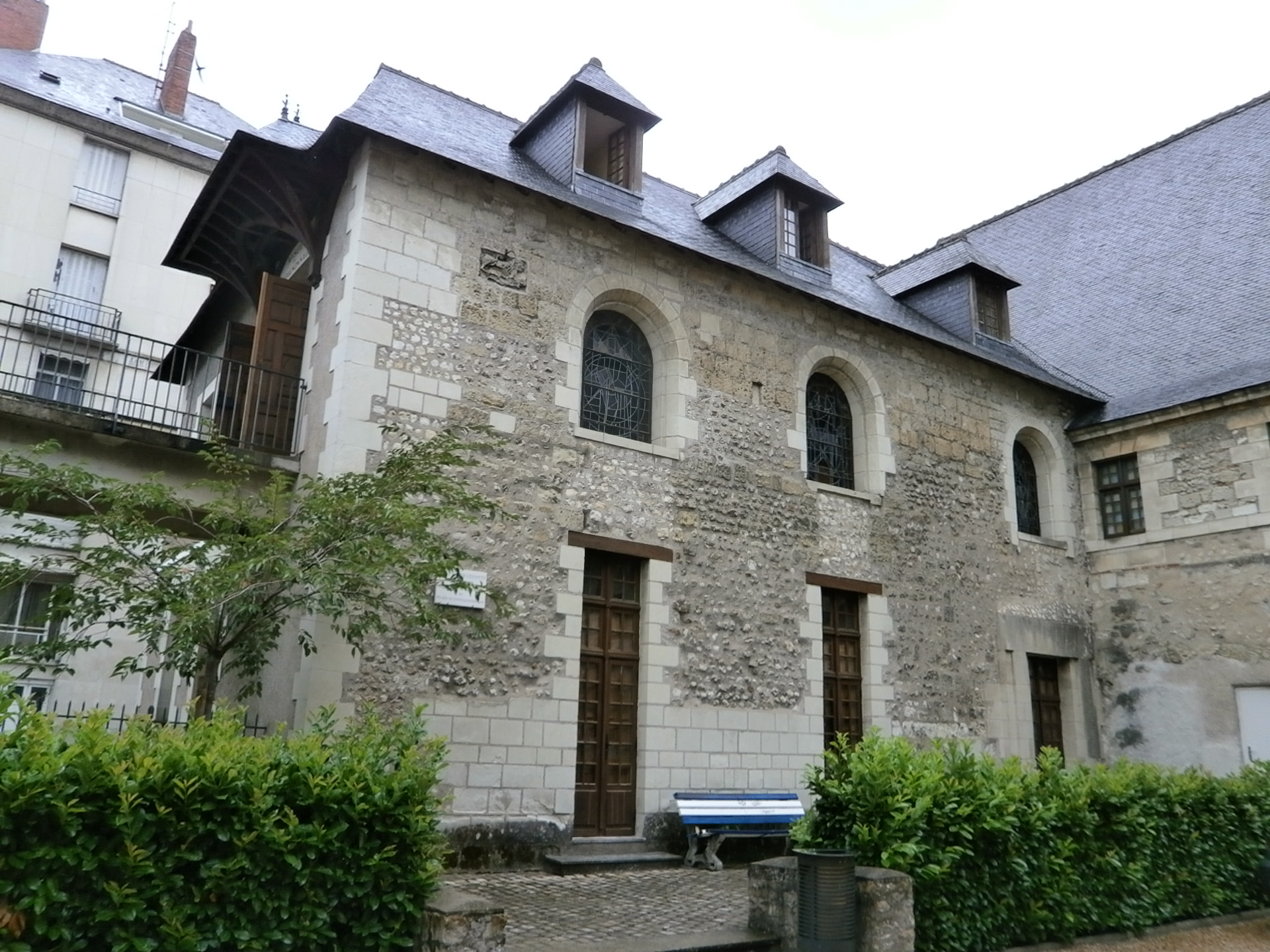 Abbaye Saint-Julien de Tours - dortoirs